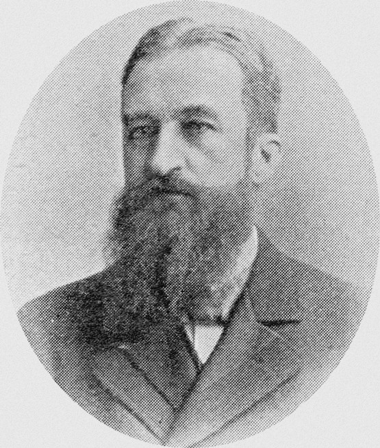 Wilhelm Riedel (1849 - 1929), Český podnikatel ve sklářství.